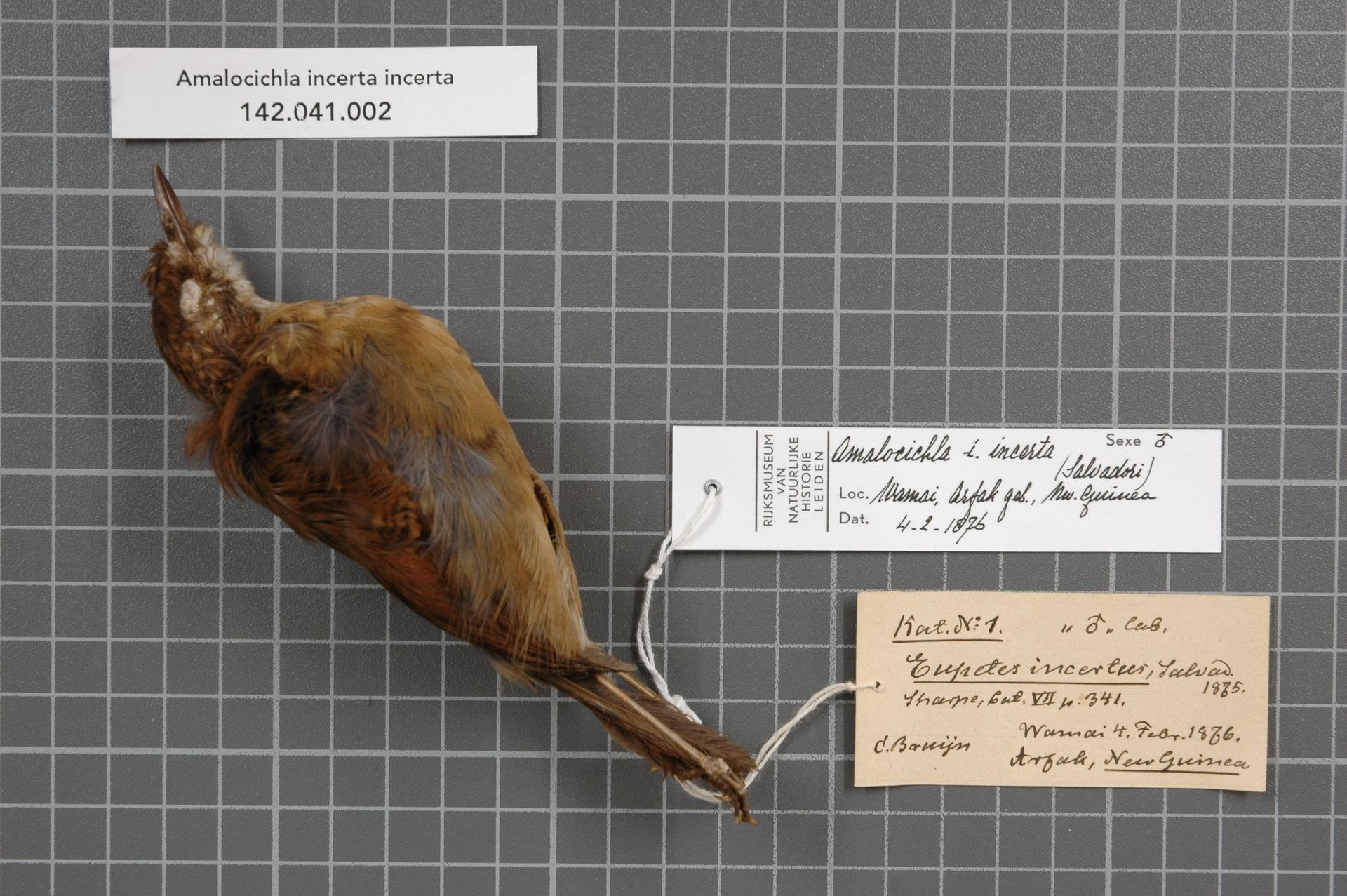 Amalocichla incerta incerta (Salvadori, 1875)